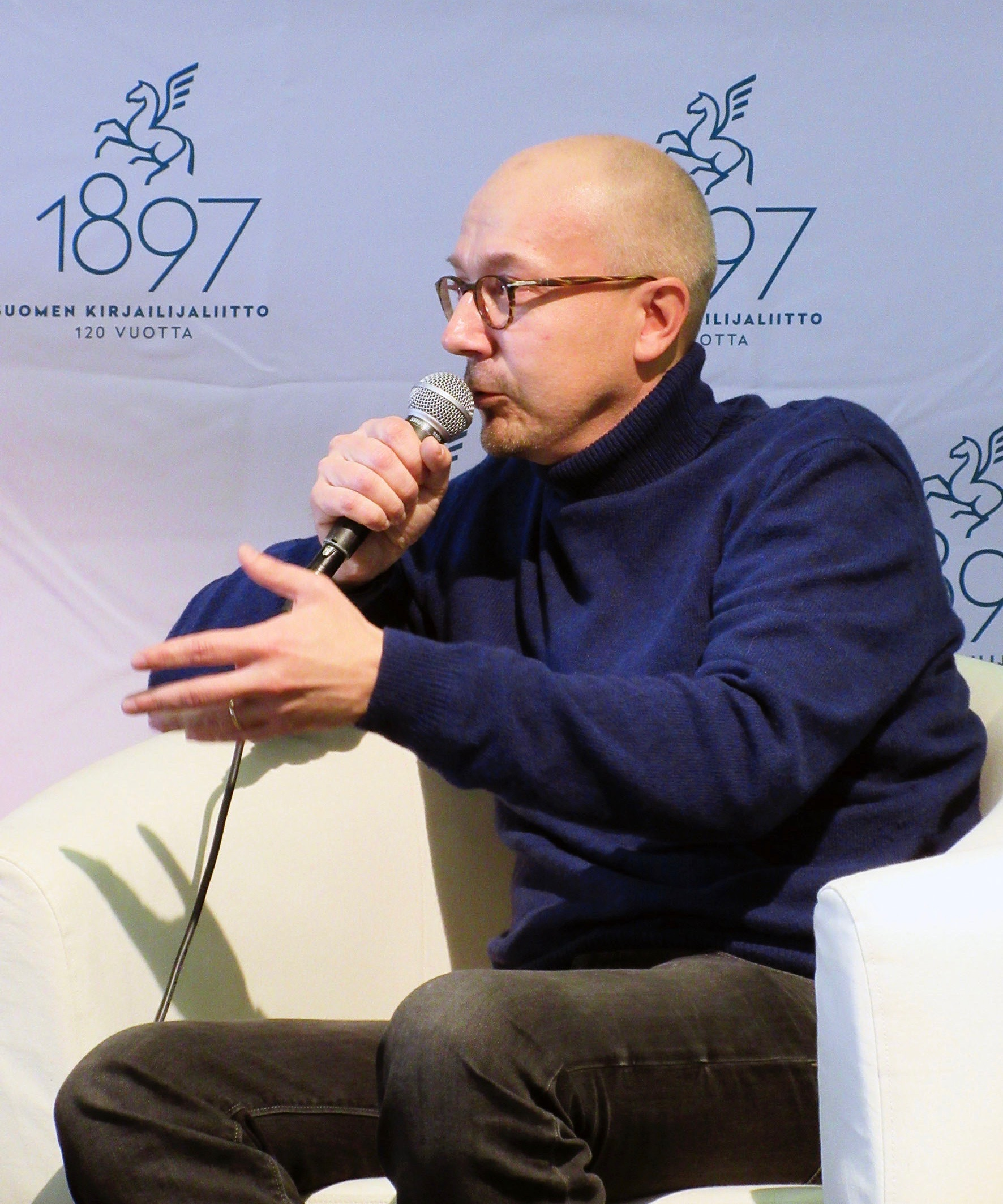 Jussi Siirilä Turun kirjamessuilla vuonna 2017. Kuva: Jaana Tamminen/Suomen Kirjailijaliitto.